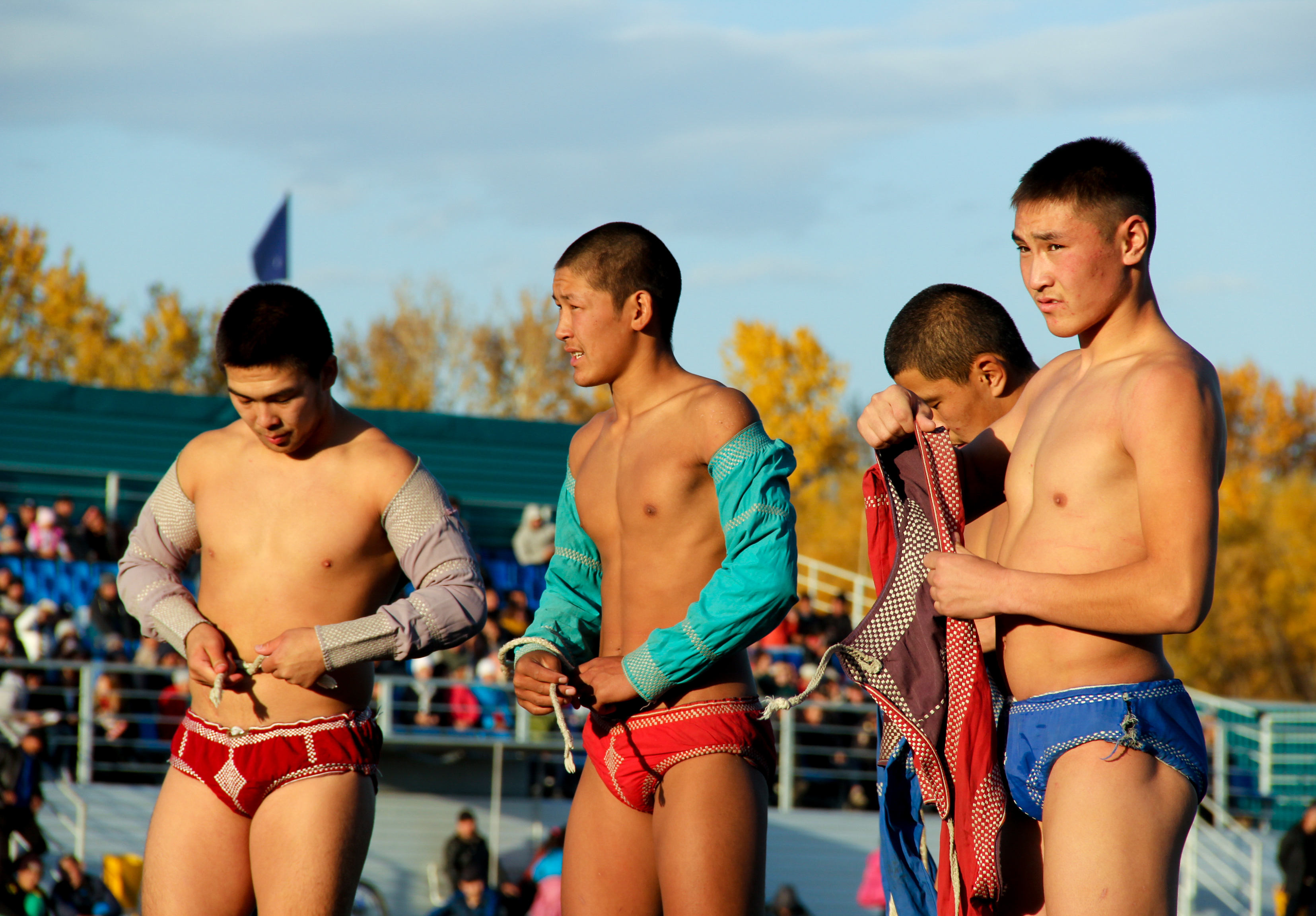 Молодые борцы Республики Тыва